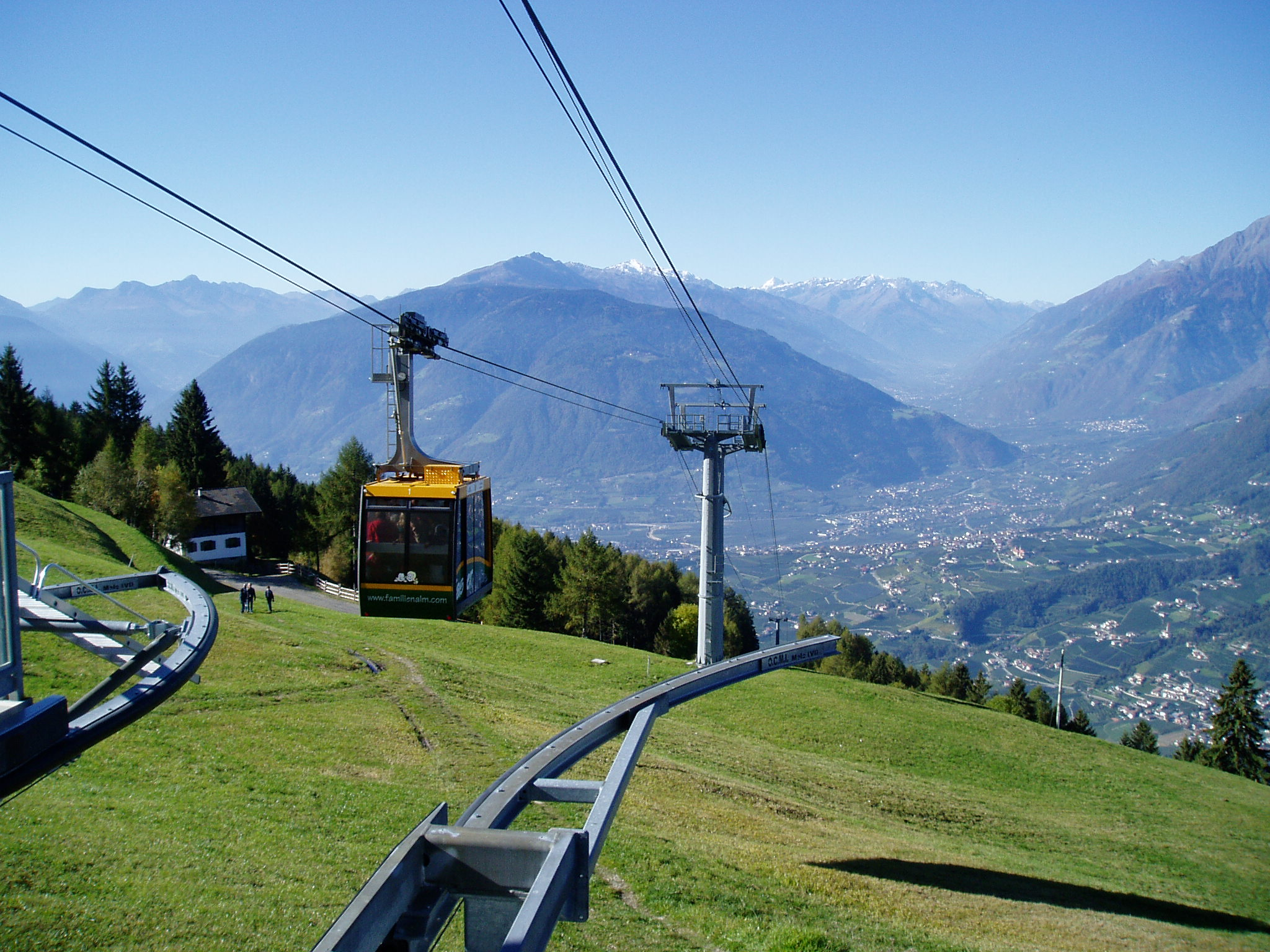 Taser-Pendelbahn im Meraner Land, Südtirol: Blick von der Bergstation Schennaberg